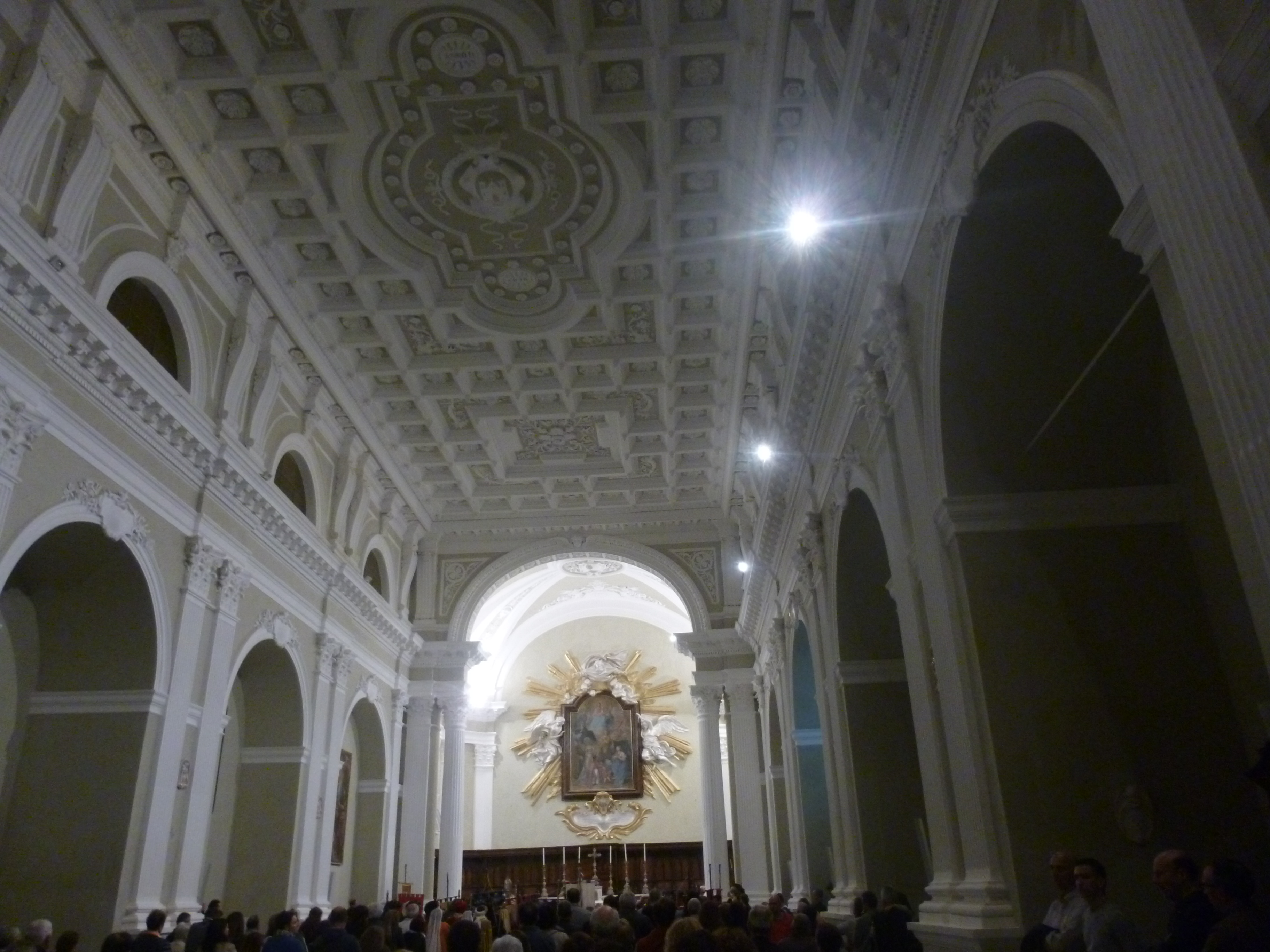 Santuario di San Severino - PALIO dei CASTELLI - Veglia Cittadina in onore del Santo Patrono, ACCENSIONE DEL FOCARACCIO, BENEDIZIONE DEGLI STENDARDI E OFFERTA DEI CERI This is a photo of a monument which is part of cultural heritage of Italy.